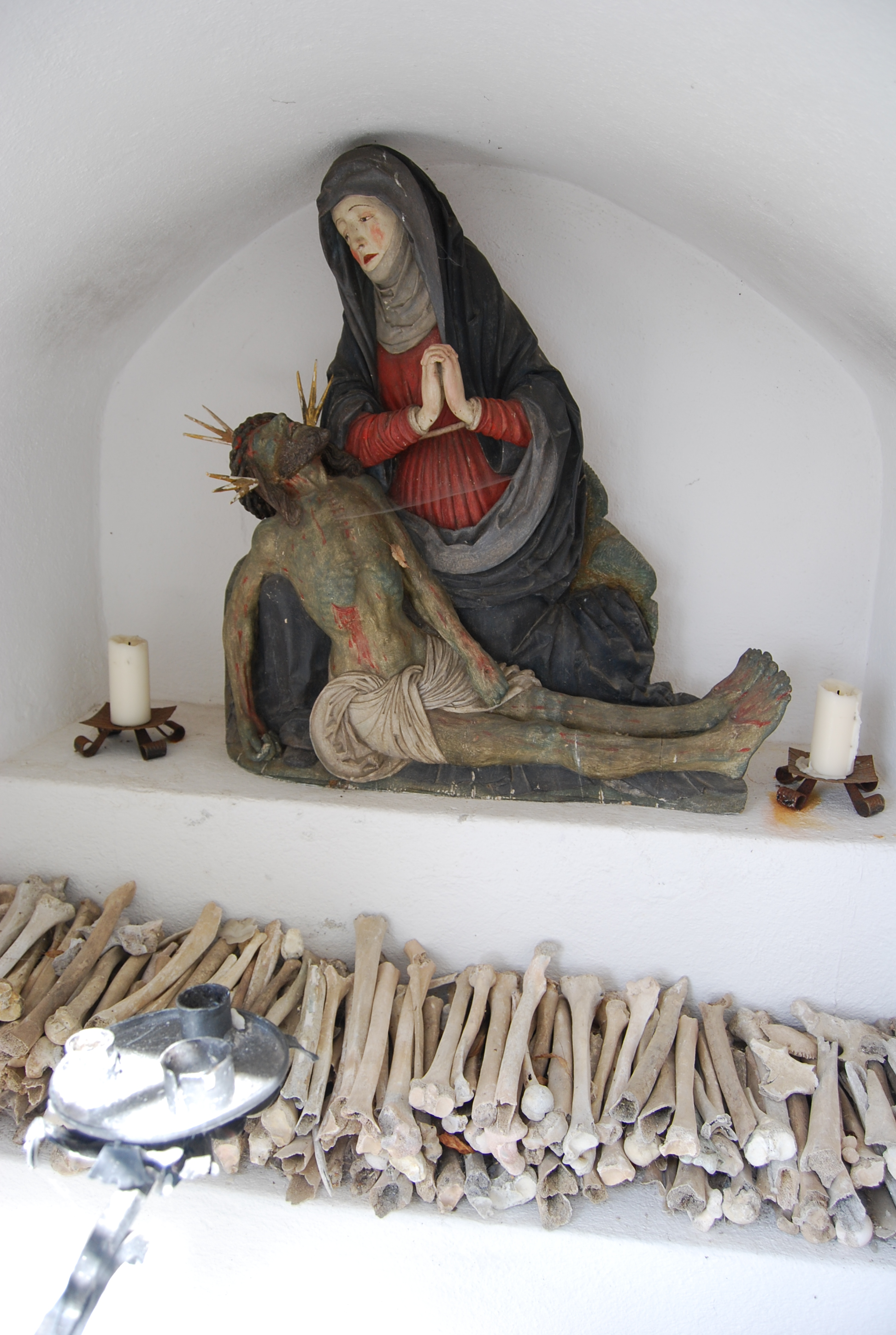 nebenstehendes Beinhaus - Schlachtkapelle Sempach